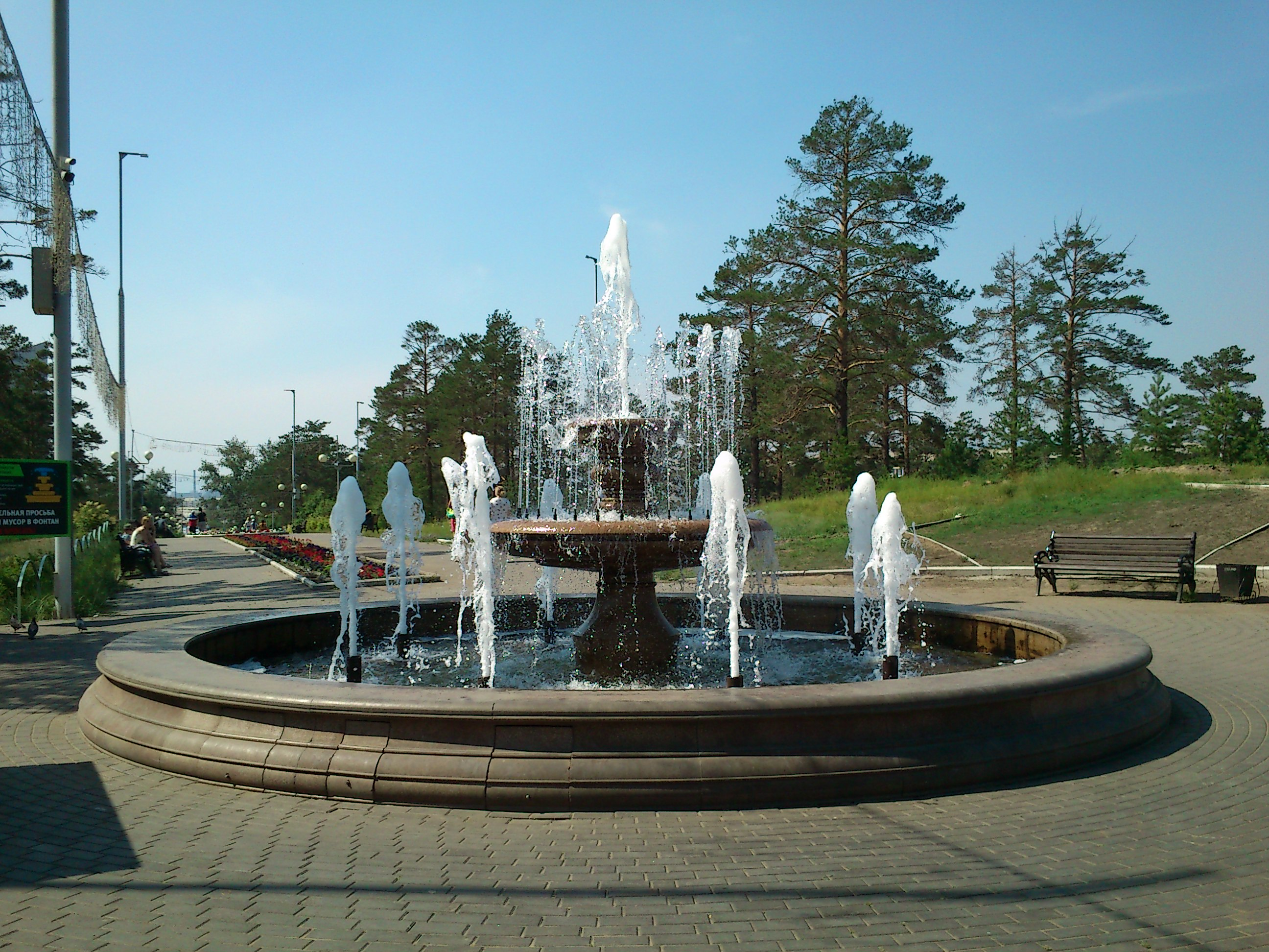 Парк Юбилейный, Центральный фонтан